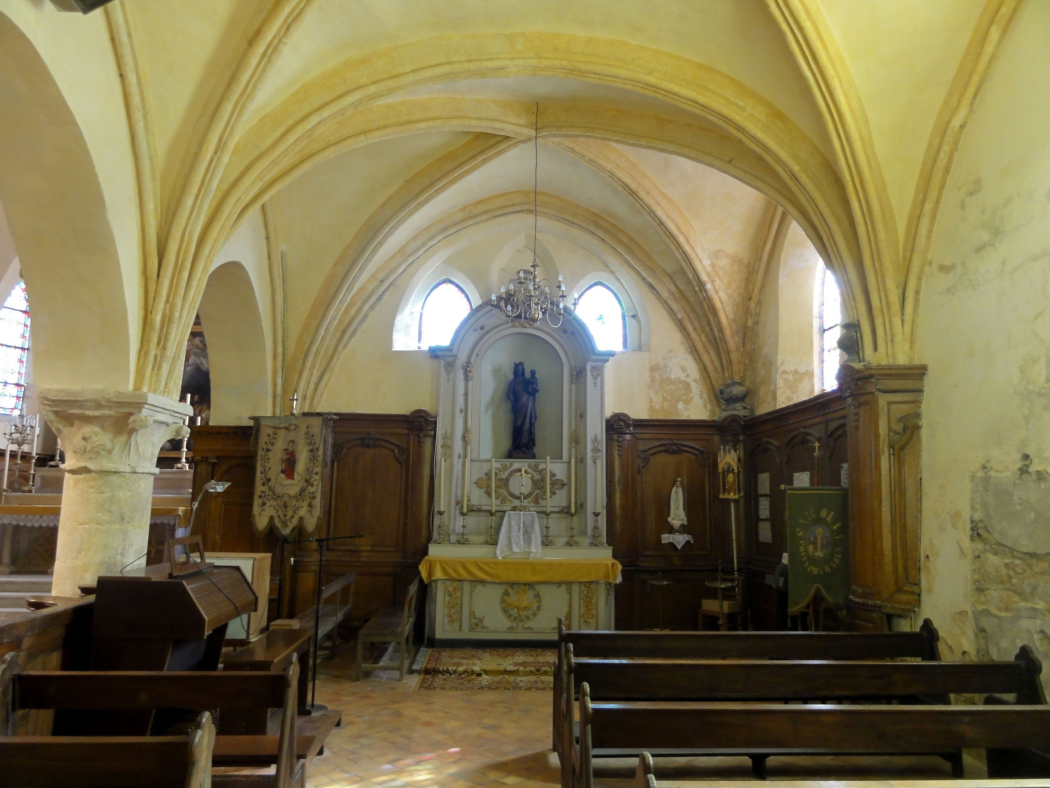 Bas-côté sud, vue vers l'est.